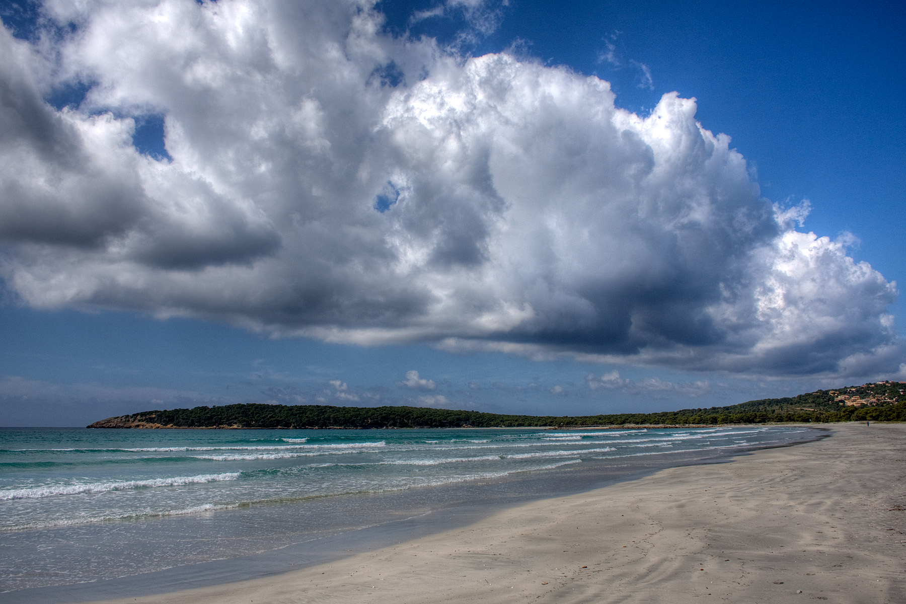 Sant'Anna Arresi (CI)